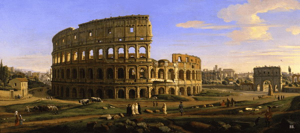 Colosseum 1707: картина